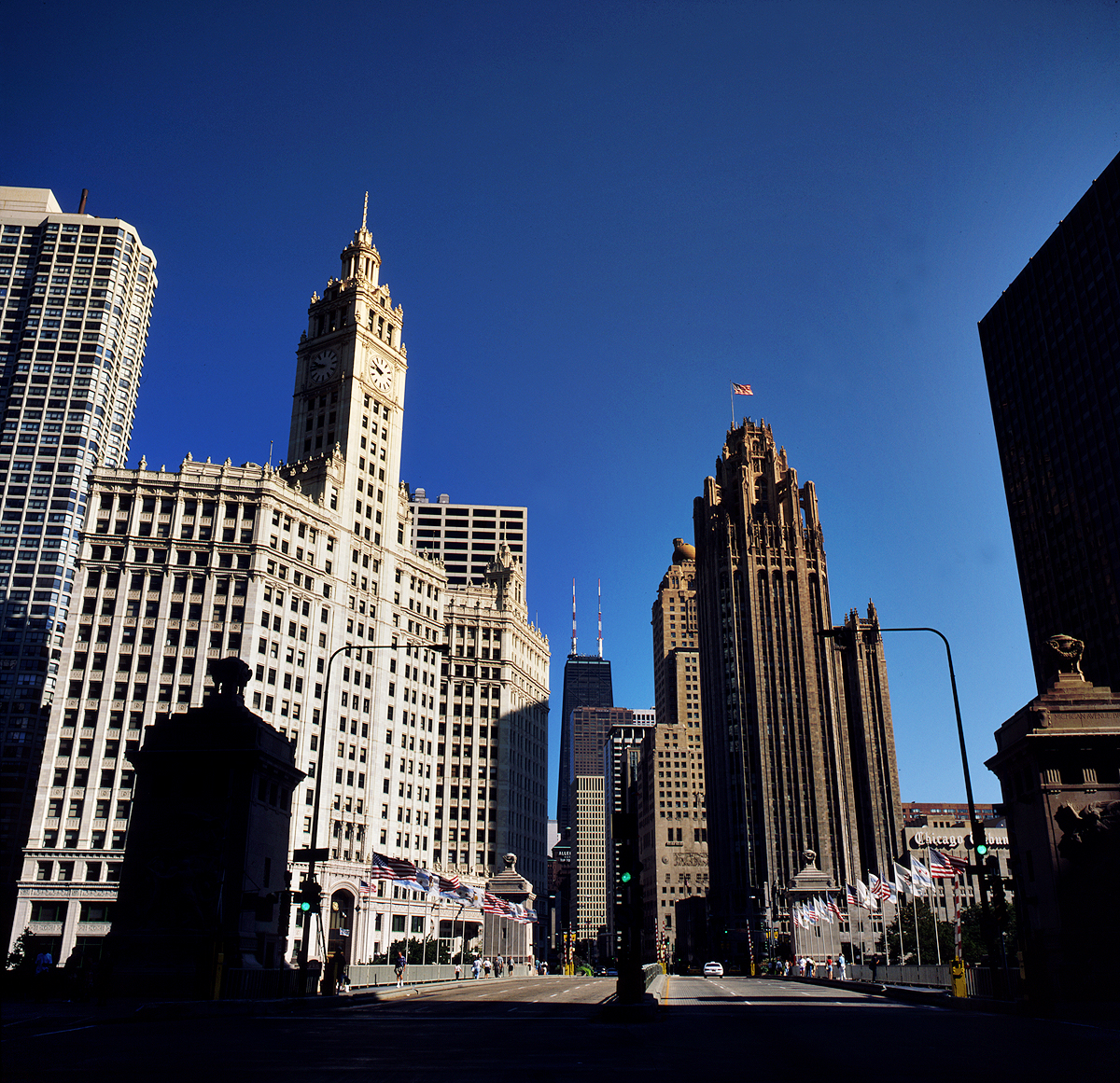 Wrigley Building (links) und Tribune Tower (rechts). Limburgs: Chicago, 't Centrum.